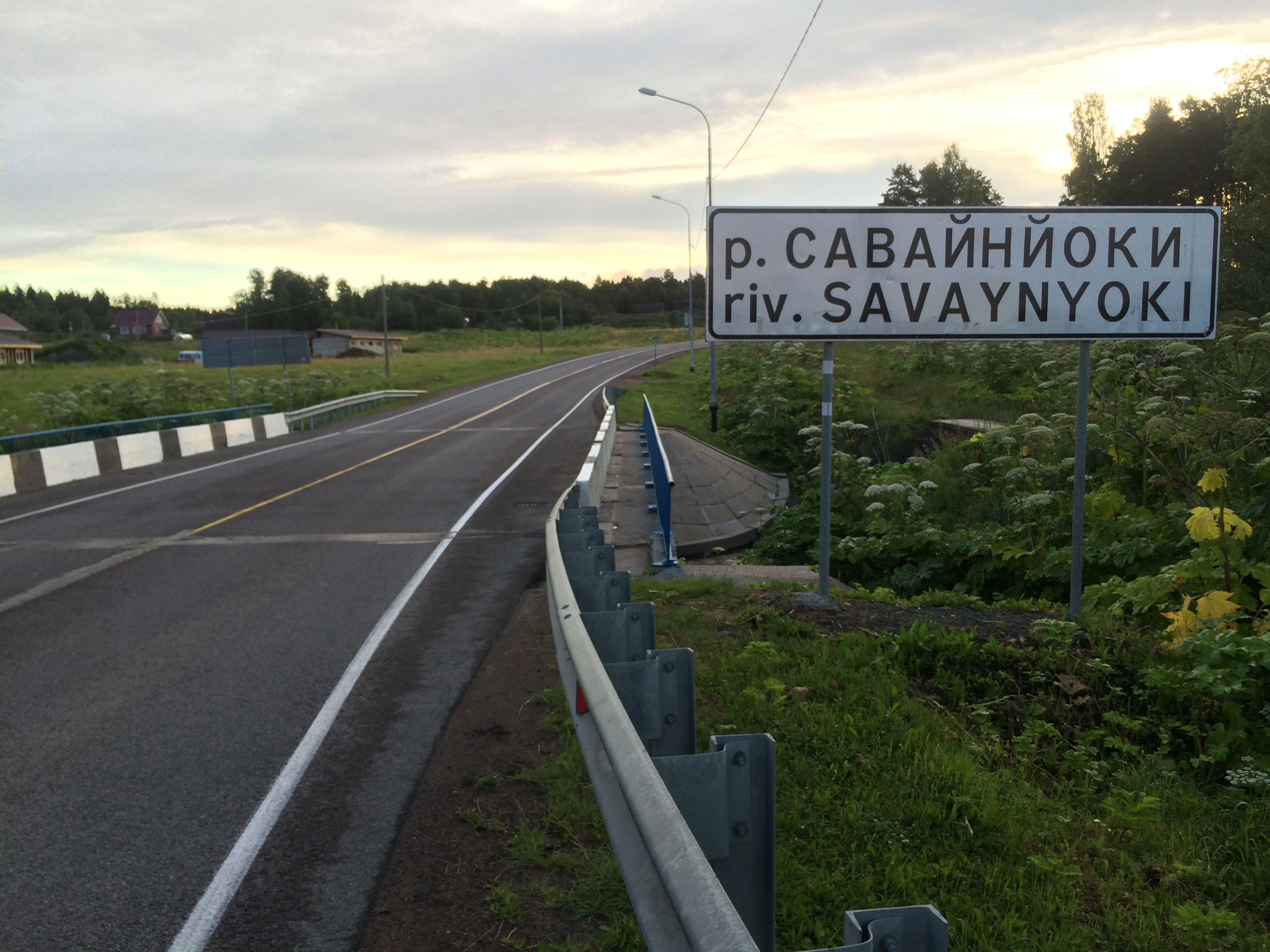 Савайнйоки